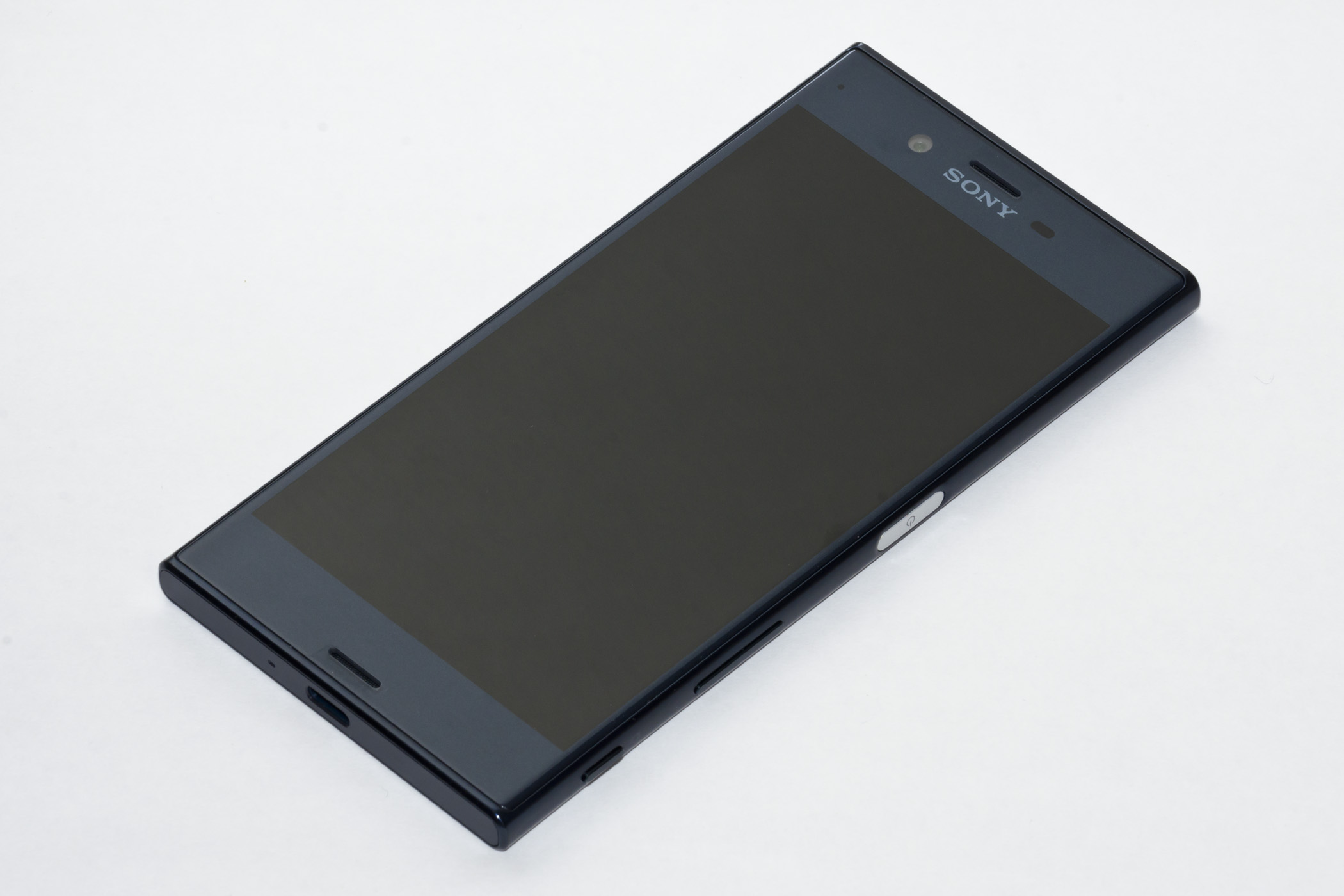 NTT docomo Xperia XZ SO-01J (Forest Blue)